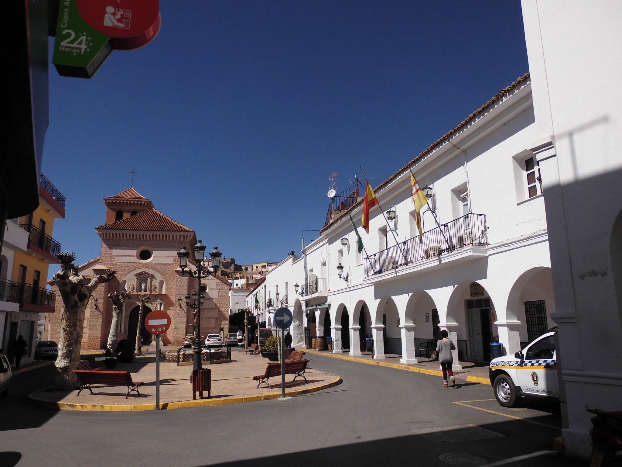 Fotografía de la Plaza de la Constitución, con la Iglesia de la Anunciación a la izquierda y el Ayuntamiento a la derecha, en Fiñana, provincia de Almería, Andalucía, España.